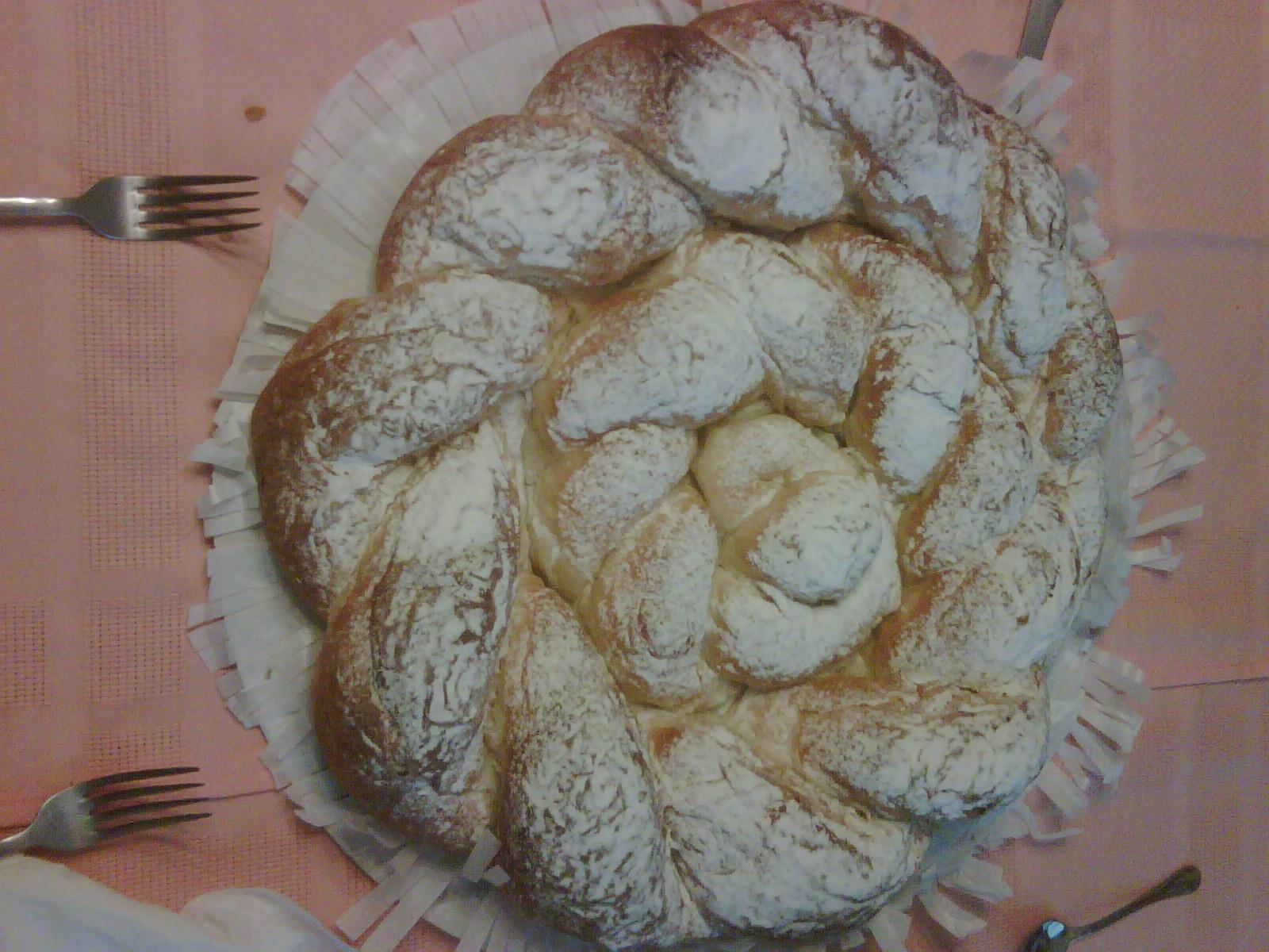 Ensaïmada Trunyellada o Trenada